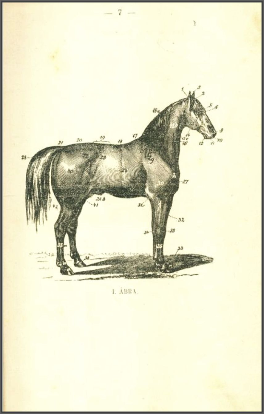 Gazdasági állatgyógyászat. Gyakorlati útmutatás a házi állatok belső és külső betegségeinek gyógykezelésére. Gazdák és állattulajdonosok számára. (264, VII. lap.) 3. kiadás. Ungvár, 1897. 7. oldal